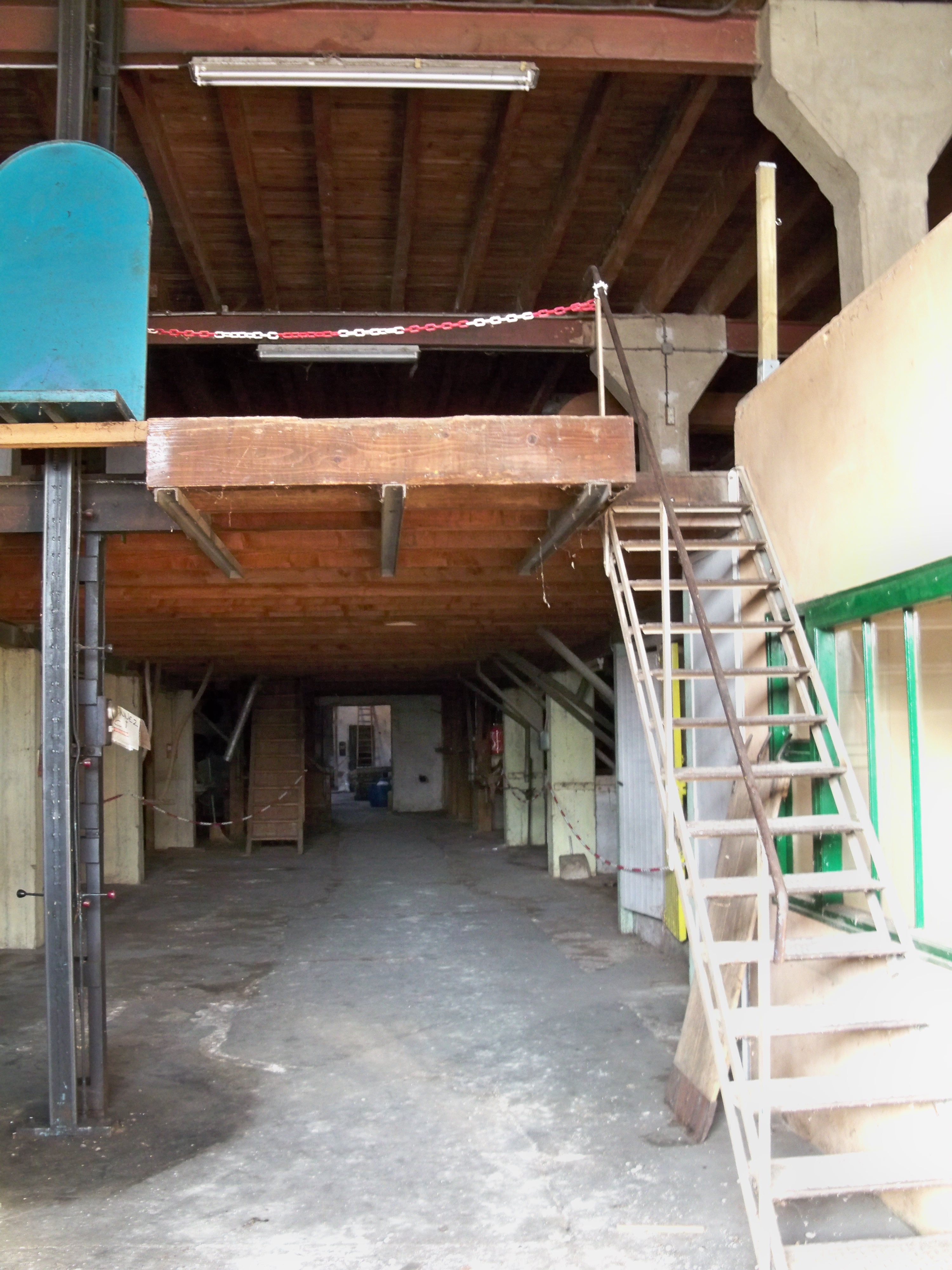 Intérieur de la Graineterie Aimé Roux, Carpentras (84) .